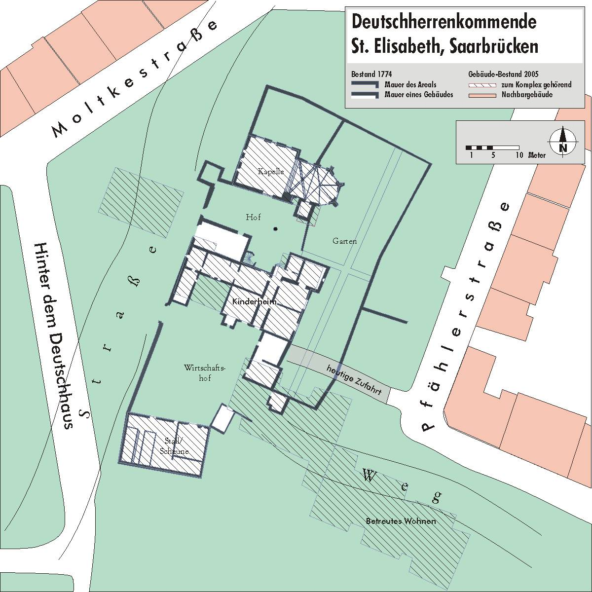 Rittergut des Deutschherrnordens St. Elisabeth, Saarbrücken